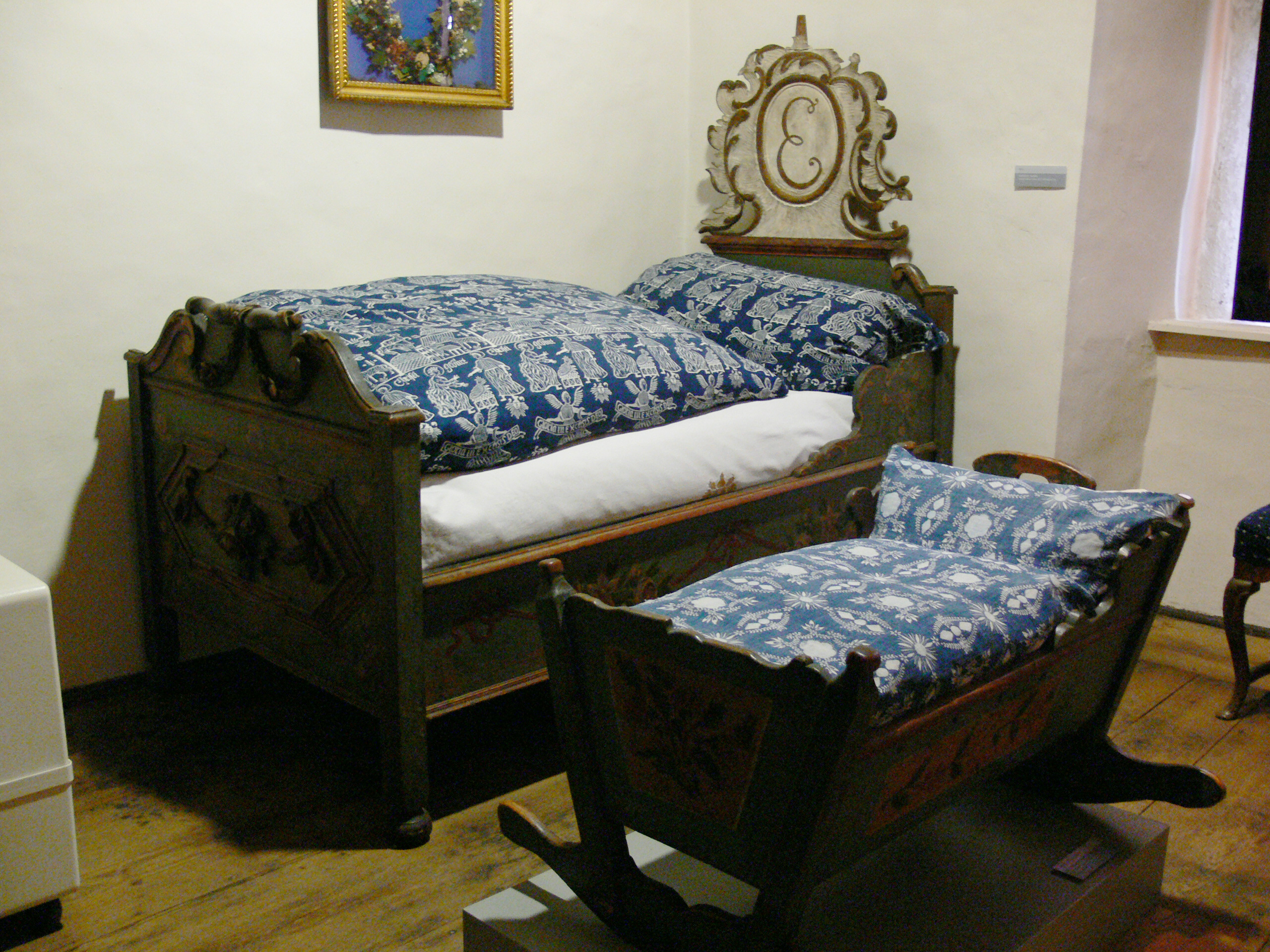 Bett und querschwingende Kufenwiege [1], 1. Hälfte 19. Jahrhundert, im Museum für Thüringer Volkskunde, Erfurt, Deutschland.